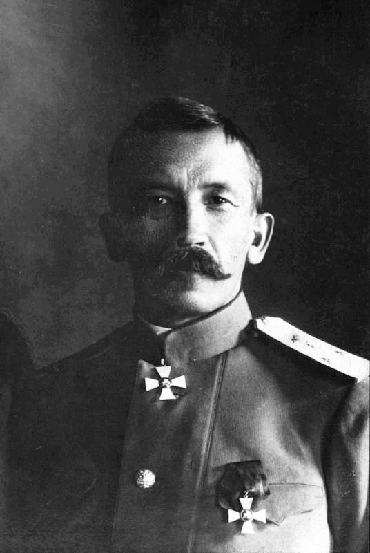 Главнокомандующий войсками Петроградского военного округа генерал-лейтенант Л.Г. Корнилов